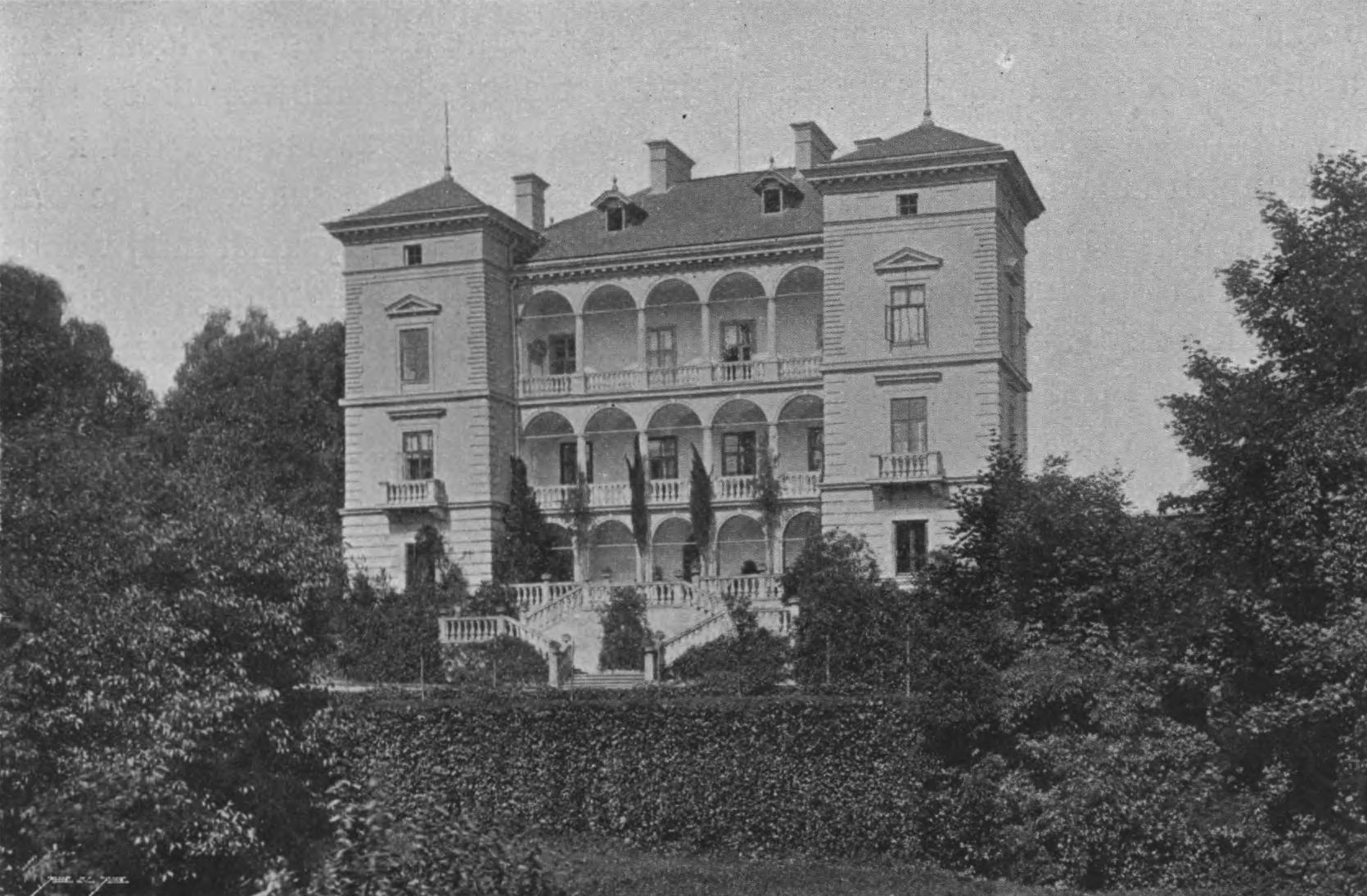 Willa Decjusza. Kraków